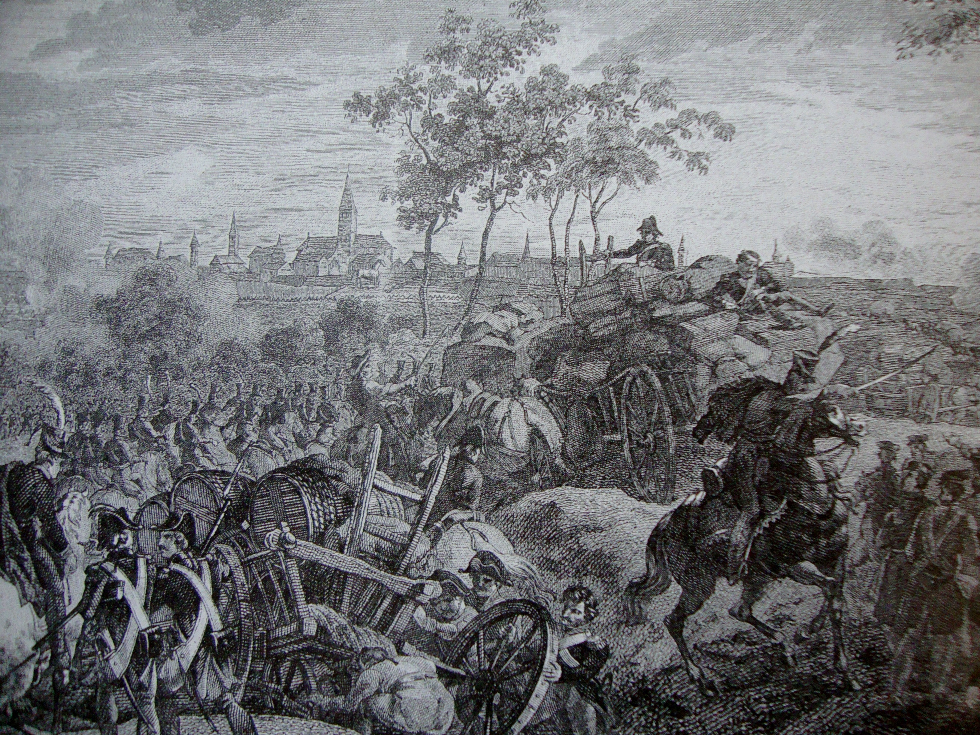 Thionville (57) - Siège de 1792